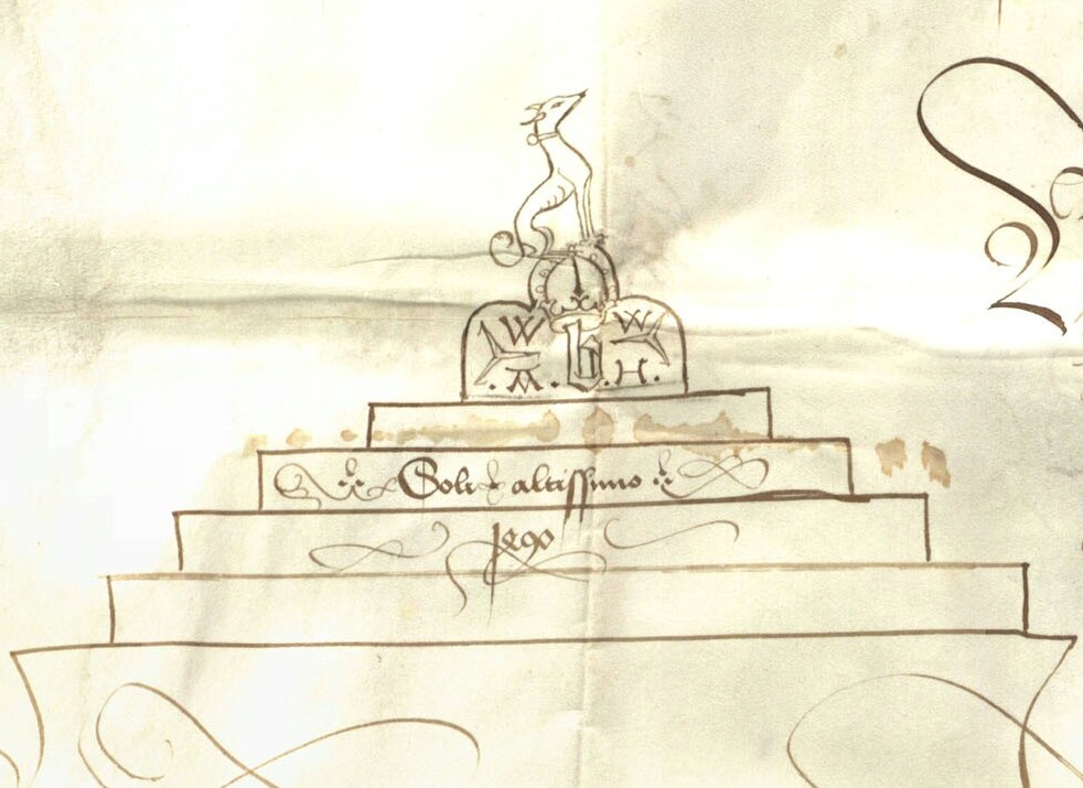 Notariatszeichen des Augustin von Hammerstetten. Ausgestellt am 4. November 1490 in Linz, BayHStA München, KU Windberg Nr. 736